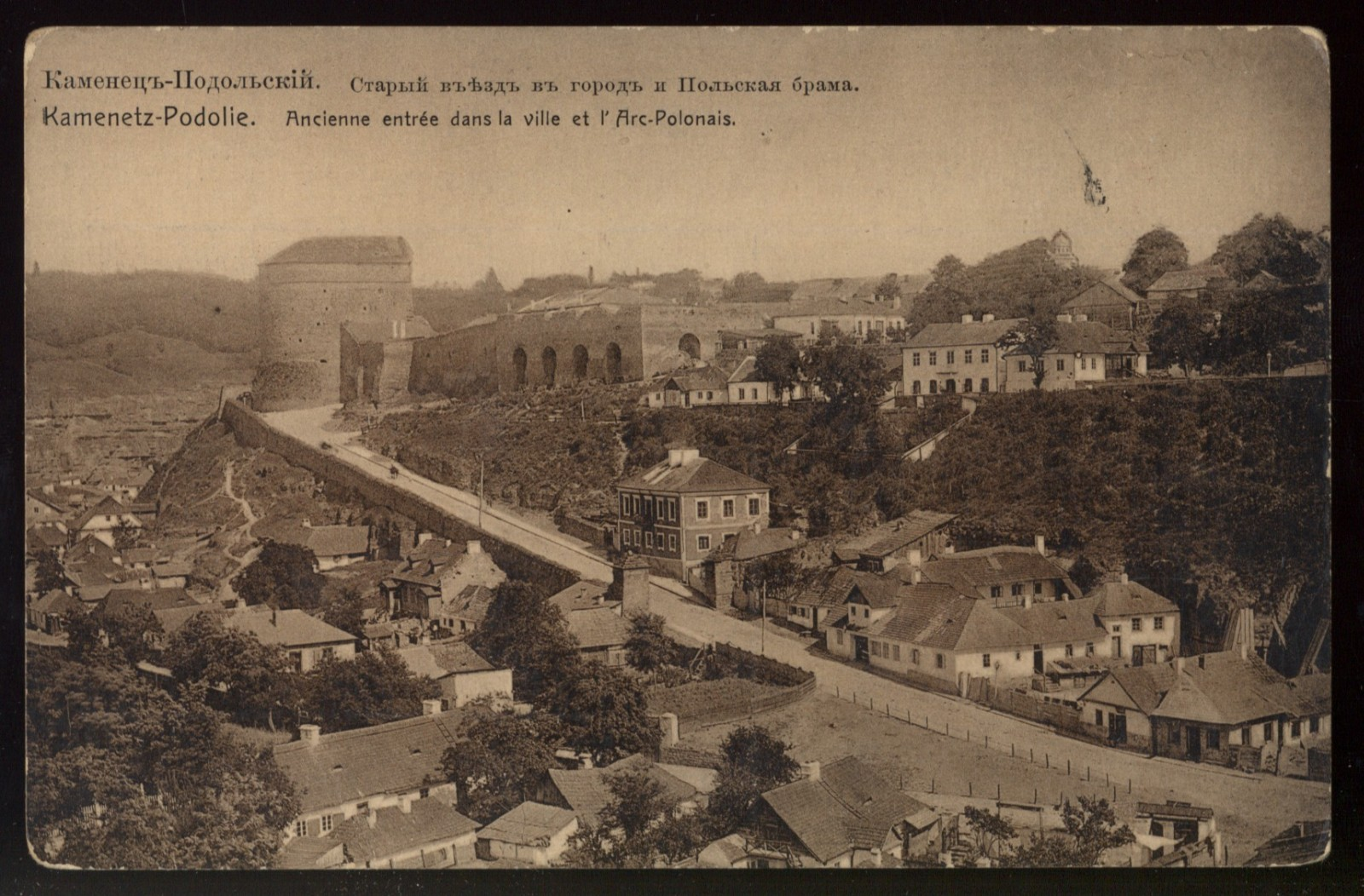 Комплекс Польської брами: Комплекс Польської брами. Старий в'їзд до міста. Башта Баторія. Вітряні ворота. Середні ворота (два стовпи з гербом Поділля)